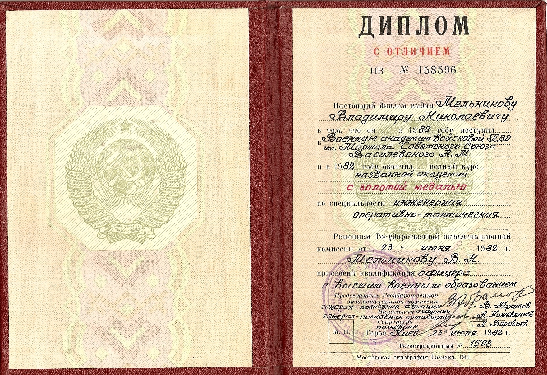 Диплом Мельникова Володимира Миколайовича від 23.06.1982 року про закінчення із золотою медаллю Військової академії В ППО ім. Маршала Радянського Союзу Василевського О.М.